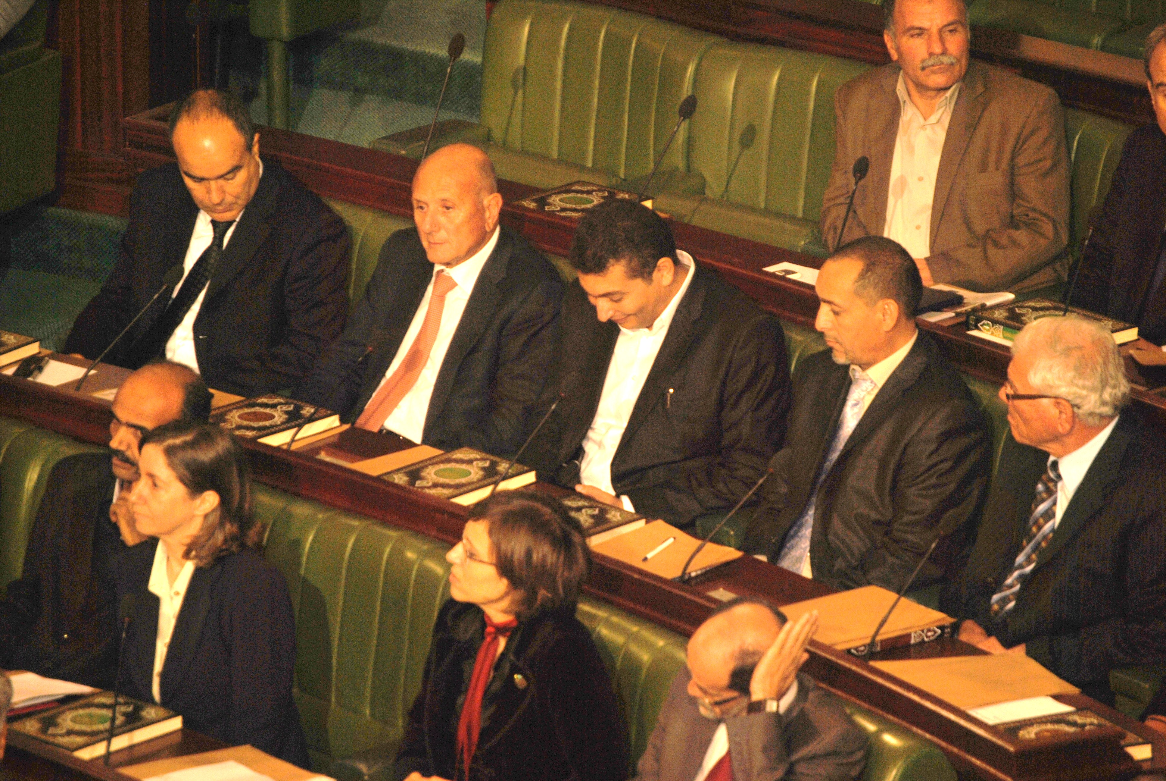 Séance d'ouverture de l'assemblée nationale constitutionnelle de Tunisie. On voit Maya Jribi en bas à gauche et Ahmed Néjib Chebbi en haut et deuxième à gauche.